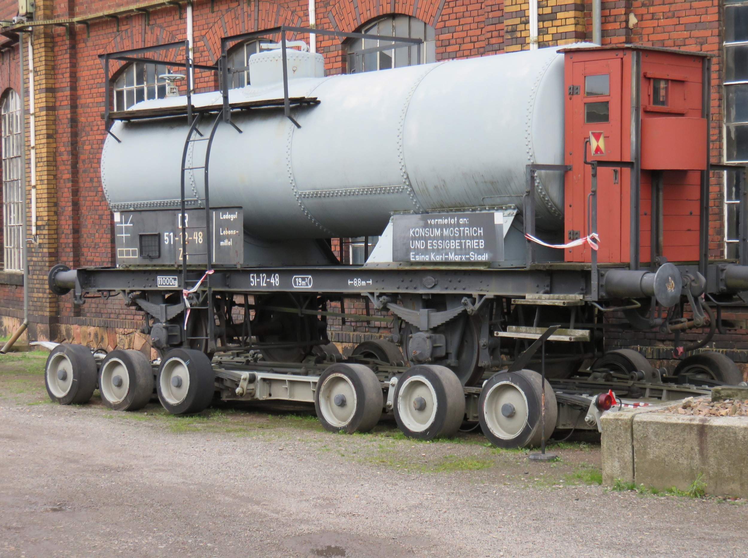 Sächsisches Eisenbahnmuseum, Ringlockschuppen, Schornstein, diverse Gebäude und Fahrzeuge. Teil der Sachgesamtheit, Sächsisches Eisenbahnmuseum, Chemnitz-Hilbersdorf. Kesselwagen („vermietet an: KONSUM MOSTRICH UND ESSIGBETRIEB Esina Karl-Marx-Stadt“)